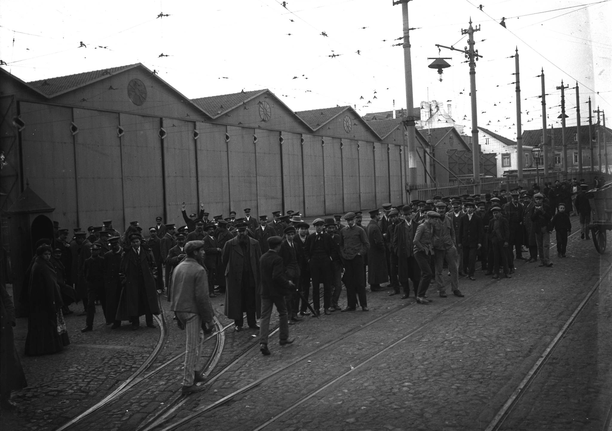 O pessoal dos eléctricos em greve na estação de Santo Amaro. (PT/AMLSB/JBN/001638 = JBN001638 = A11066 = N9446)